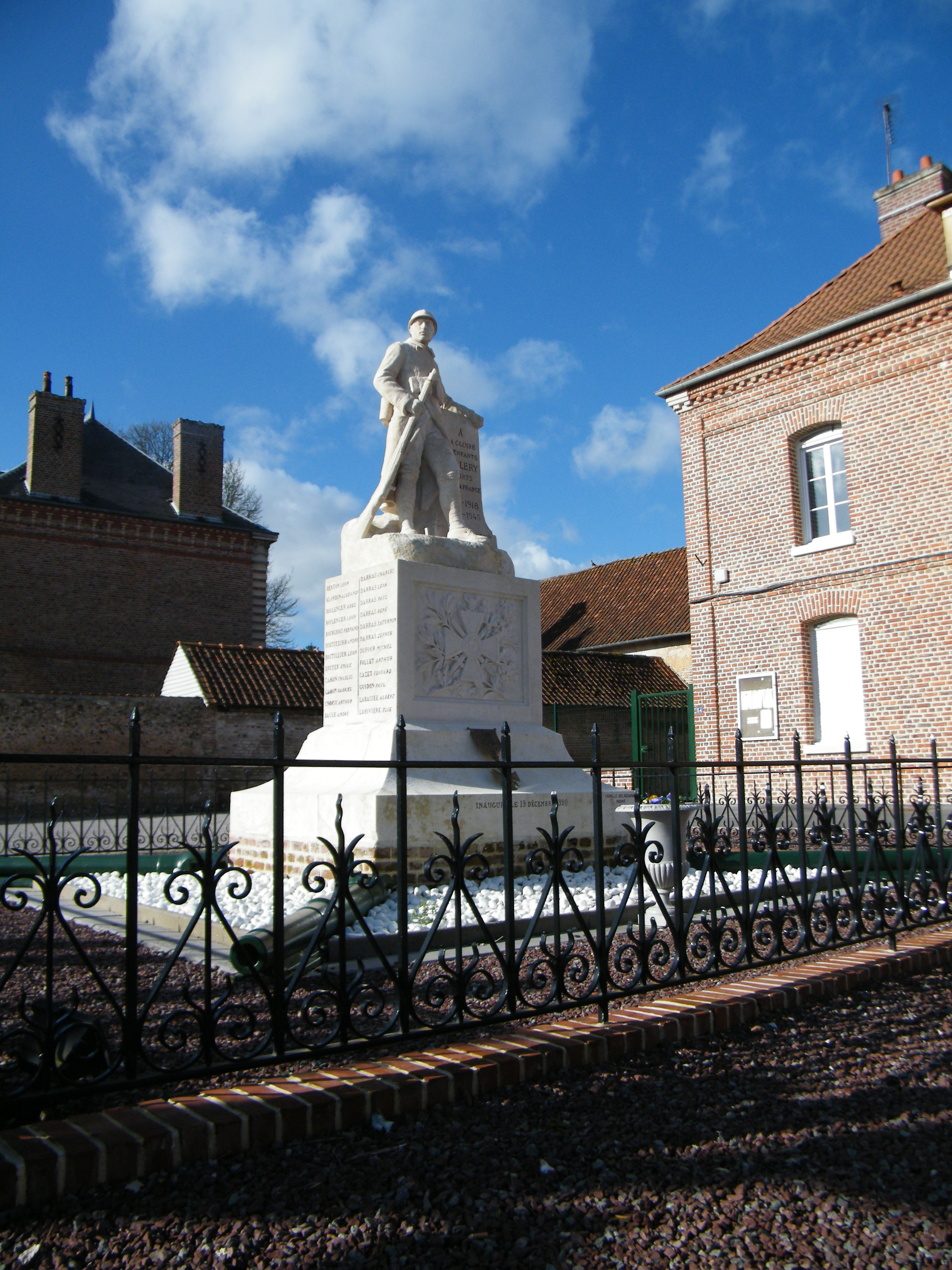 Allery, Somme, fr, monument